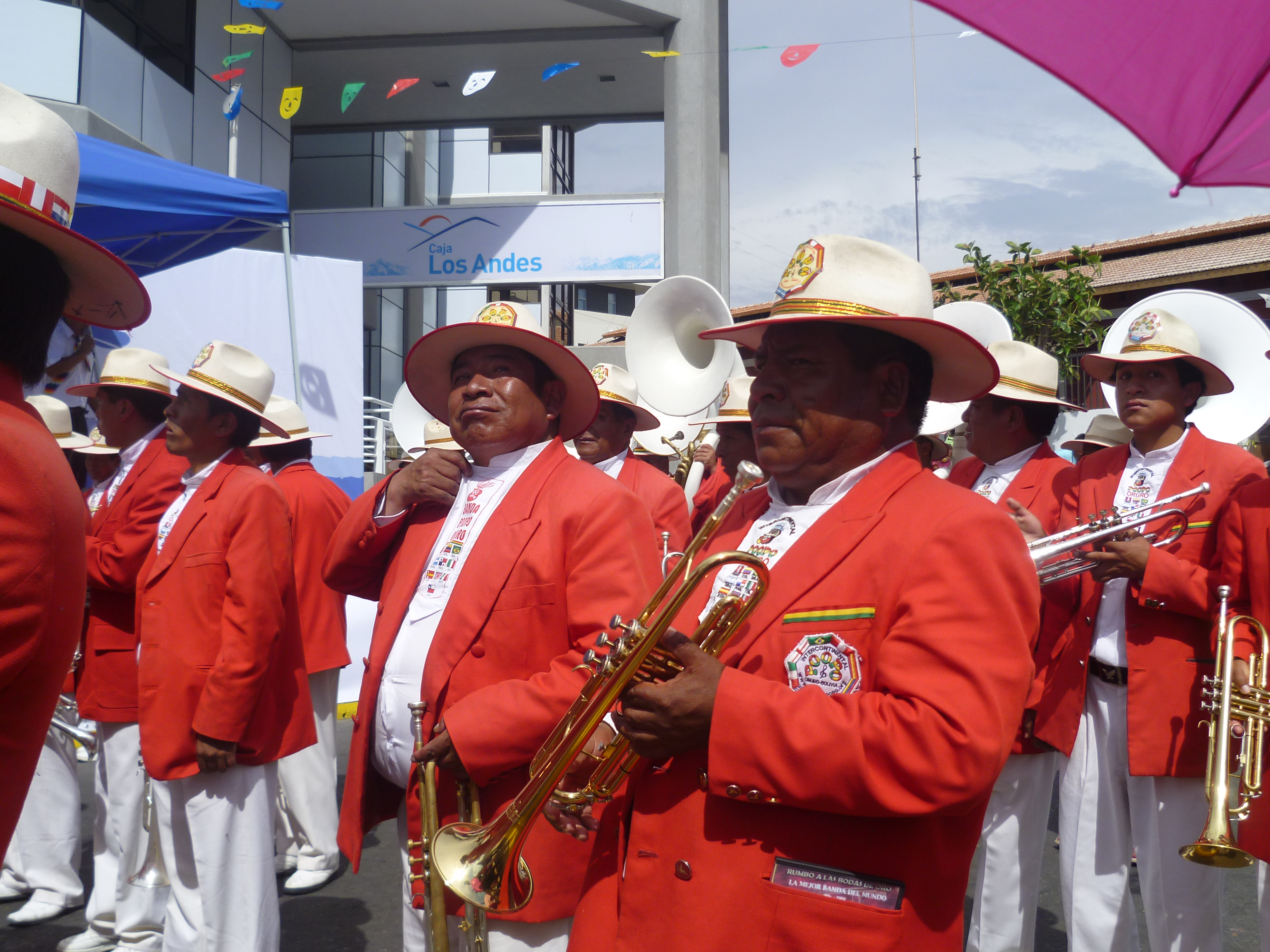 Carnaval con la Fuerza del Sol 2012